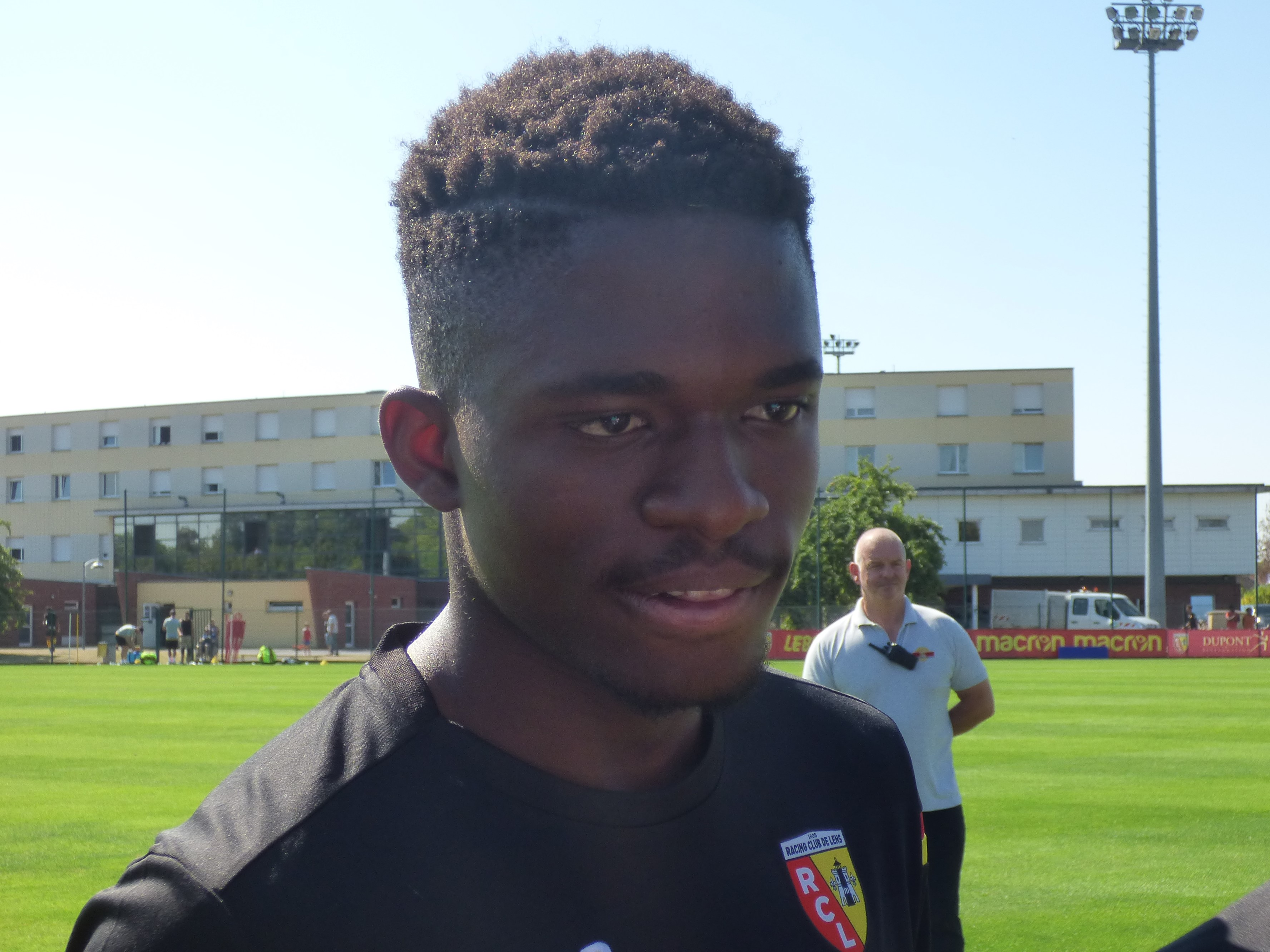 Cheick Doucouré lors d'un entraînement public du Racing Club de Lens, le 2 août 2018, au Centre technique et sportif de La Gaillette à Avion.